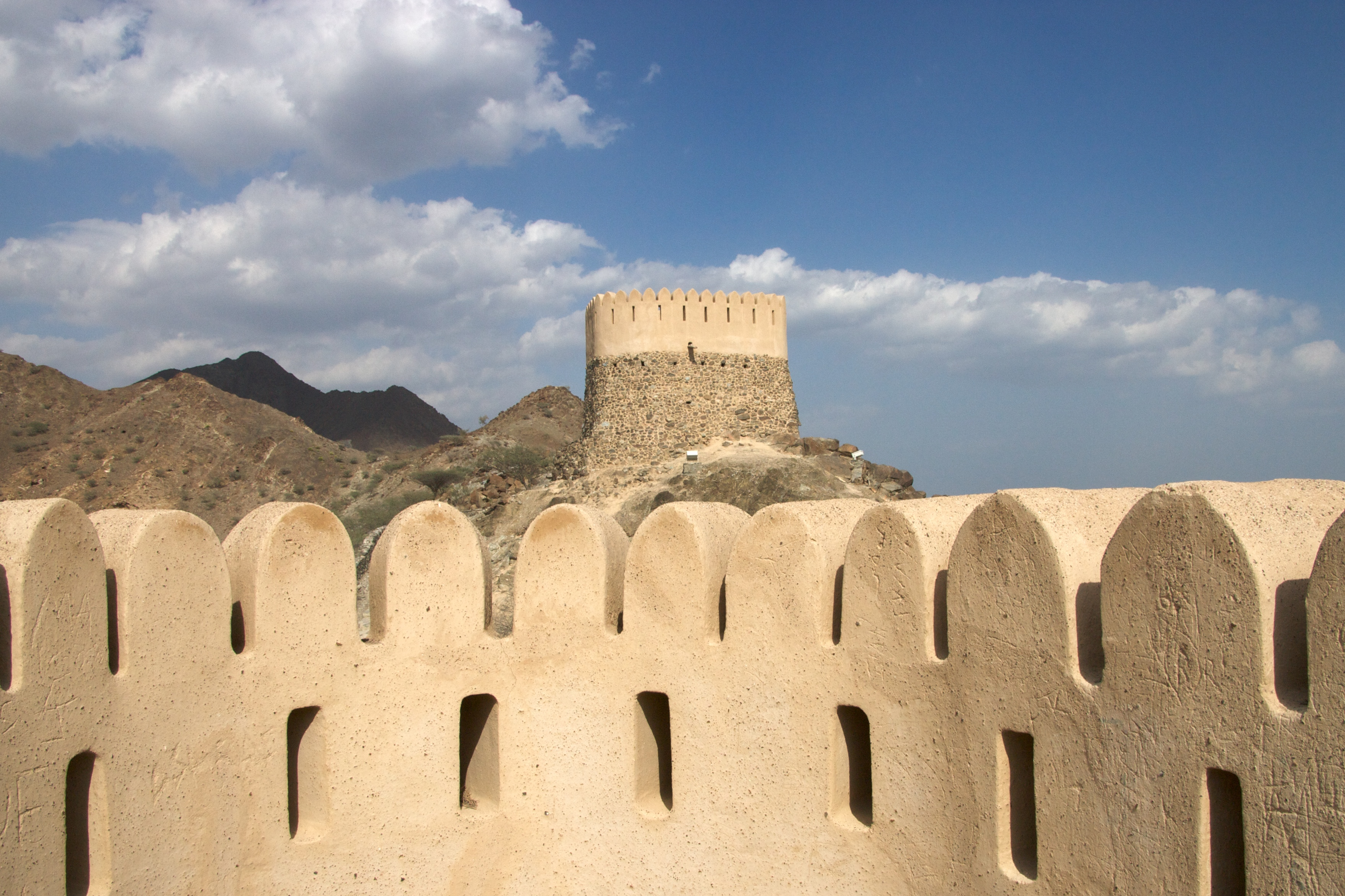 Portuguese towers, Fujairah